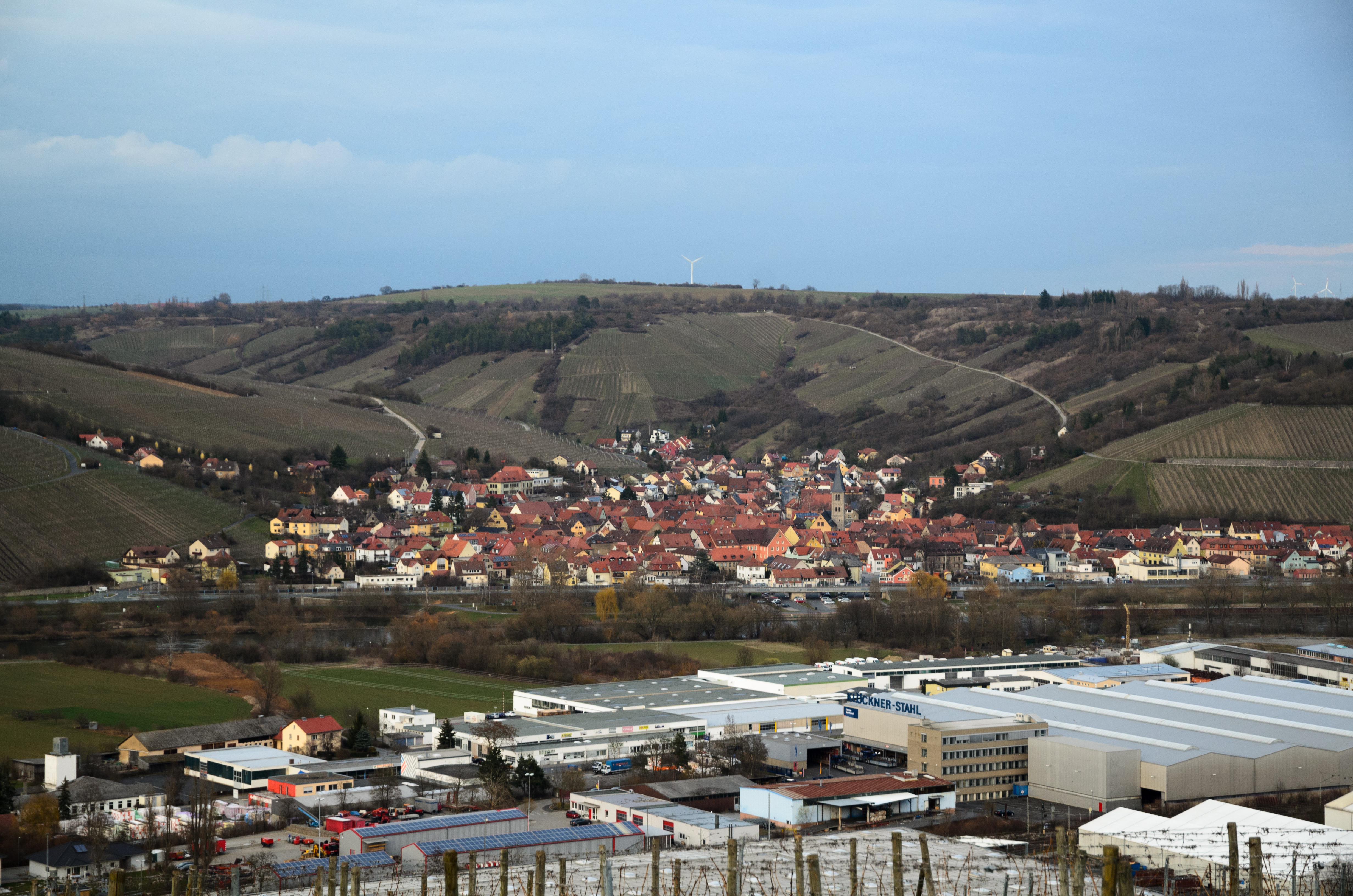 Randersacker, Panorama von Süden